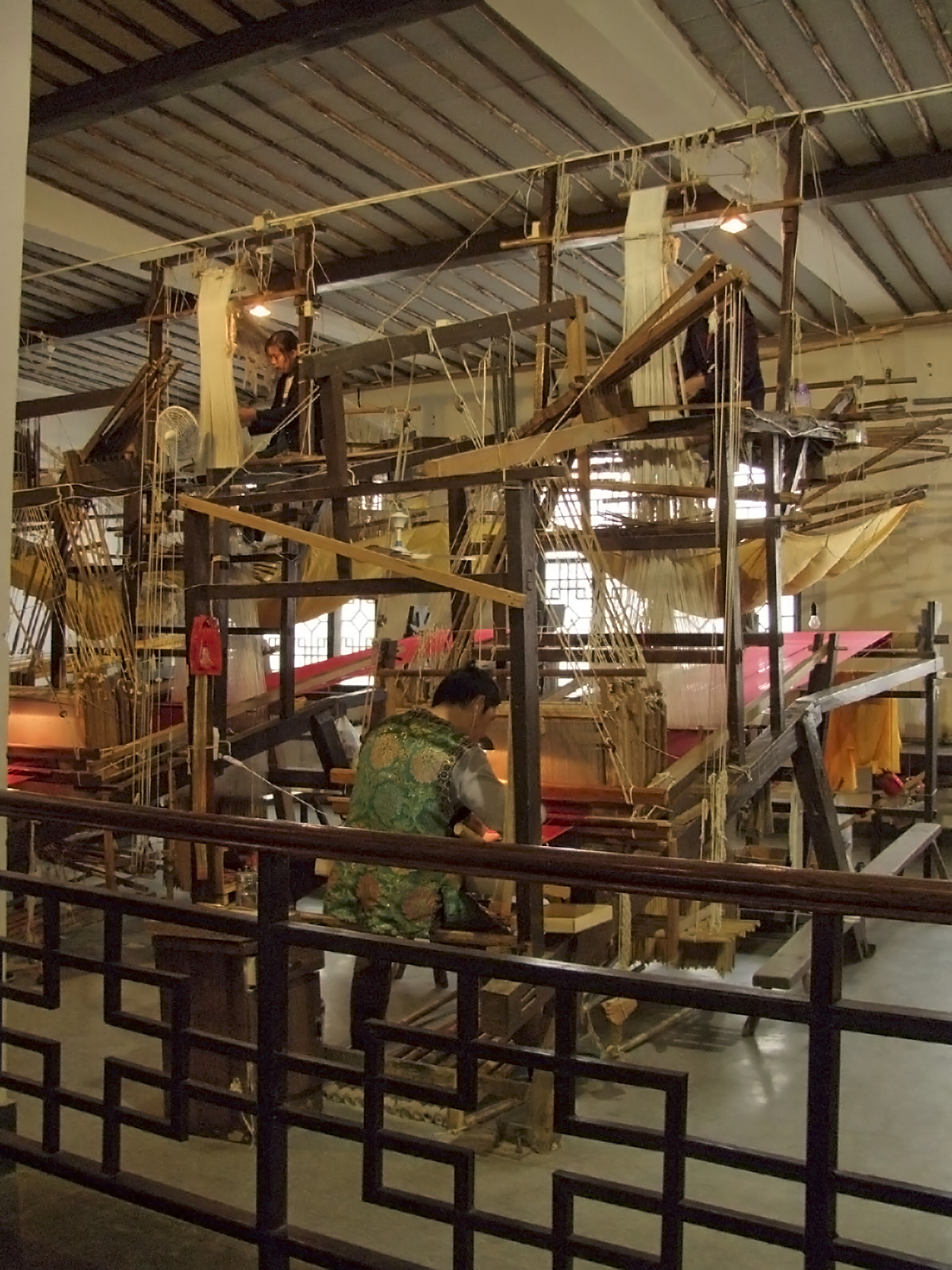 纺织工人